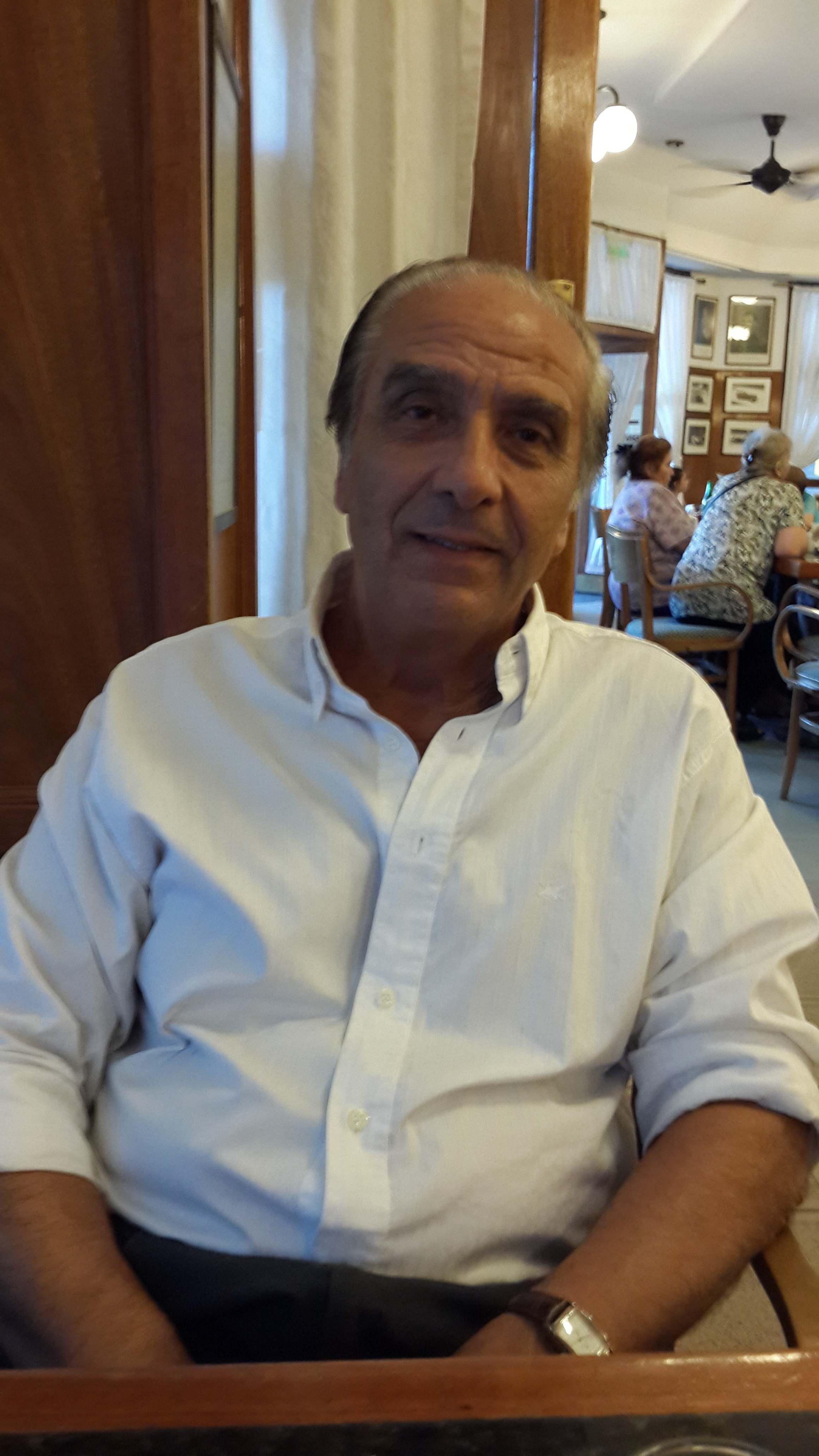 Juan Carlos Escalante